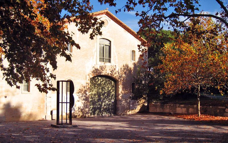 Lac face - Sigean (Aude)